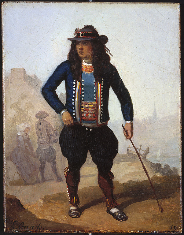 L'homme se tient debout, une baguette dans la main gauche. Il a les cheveux longs, porte un chapeau à bords étroits, une veste glazig, un gilet à plastron, une large ceinture en tissu, un bragou bras, des guêtres et des souliers. En arrière plan, on aperçoit un couple, une maison puis un clocher.